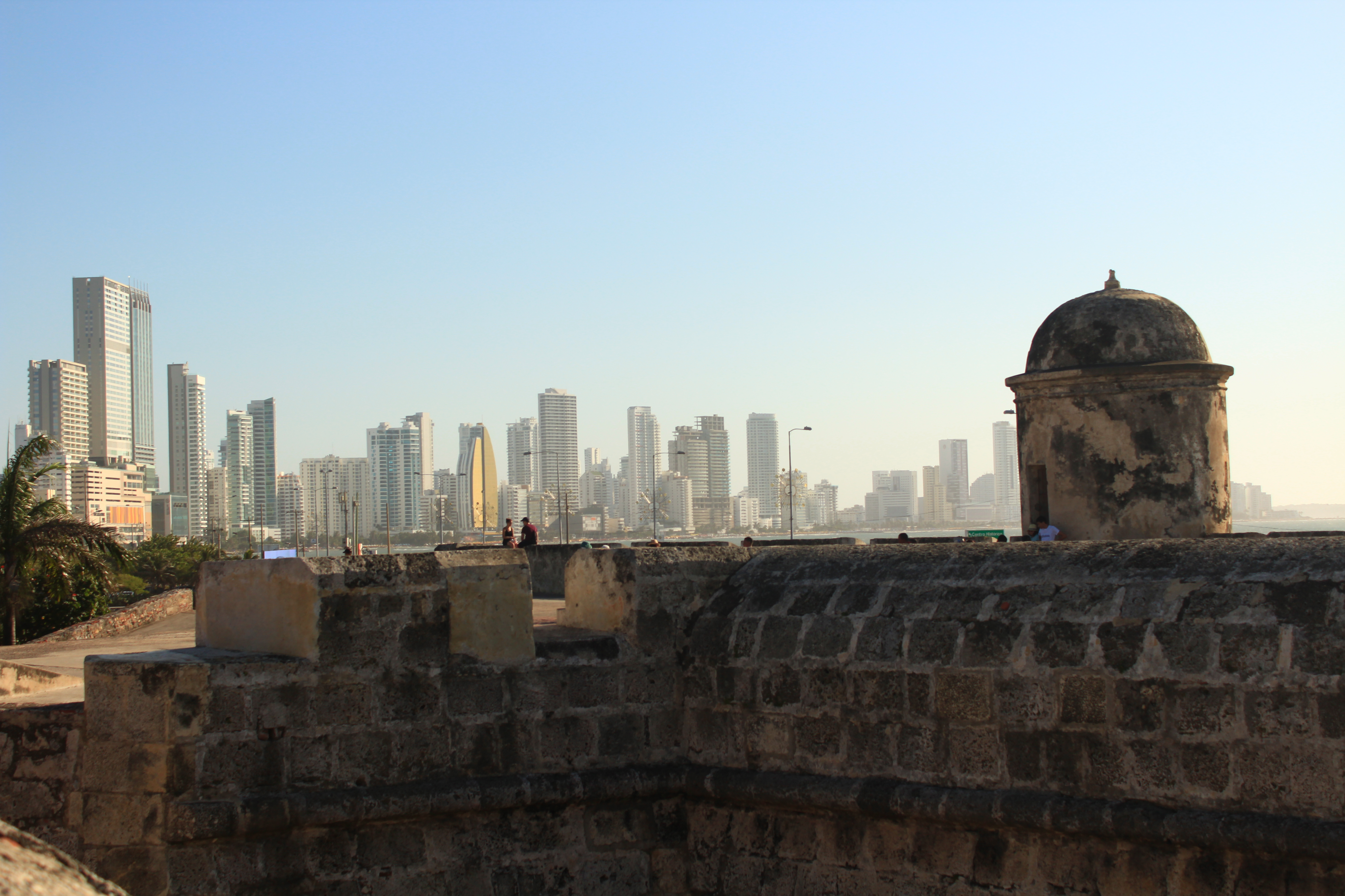 Vista de Bocagrande desde un bastión en la muralla del centro histórico de Cartagena